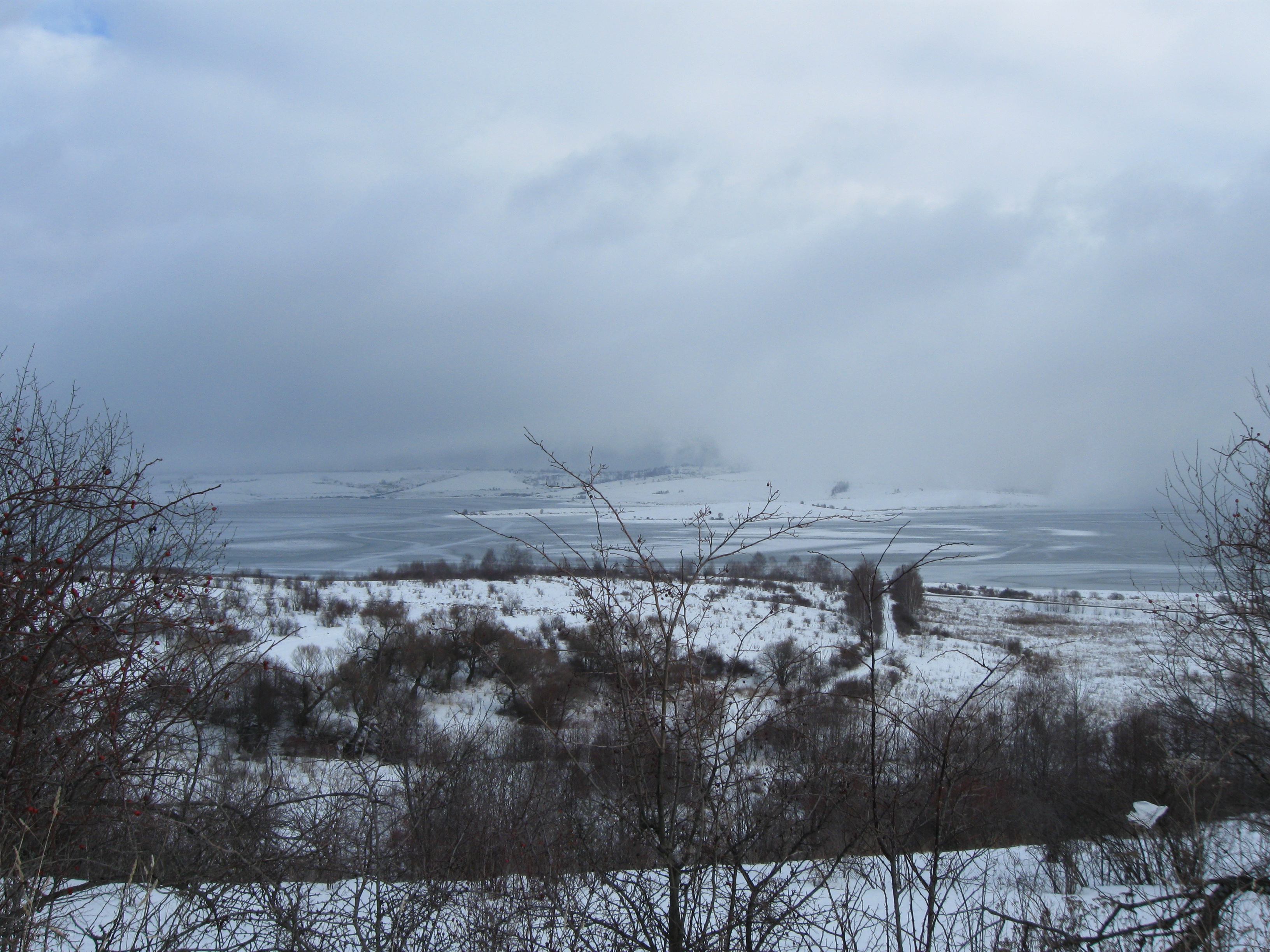 Zima na Vlasini